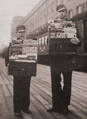 Lehtipoikia Helsingin asemalla kesäkuusssa 1931. Isompi poika on Tapio Rautavaara, josta tuli myöhemmin olympiavoittaja ja suosittu laulaja. Tätä kuvaa otettaessa Rautavaara oli juuri 16 vuotta täyttänyt ja 185 senttiä pitkä eli Rautatiekirjakaupan pisin lehtipoika. Hänen rinnalllaan seisova 17-vuotias ja 133 senttiä pitkä poika oli puolestaan yhtiön lyhin lehpipoika